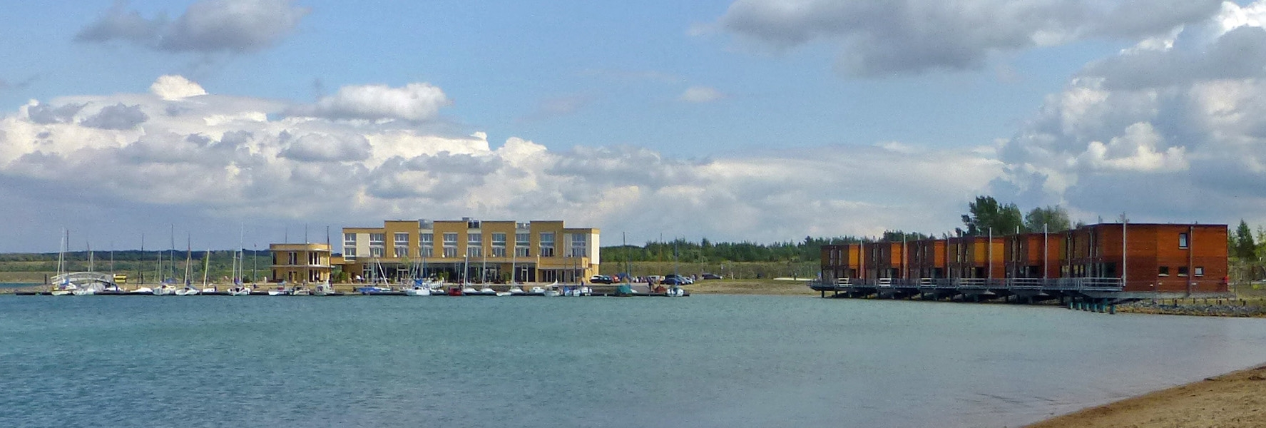 Das Ferienresort Lagovida am Störmthaler See mit Hotel, Sportboothafen und Hafenhäusern